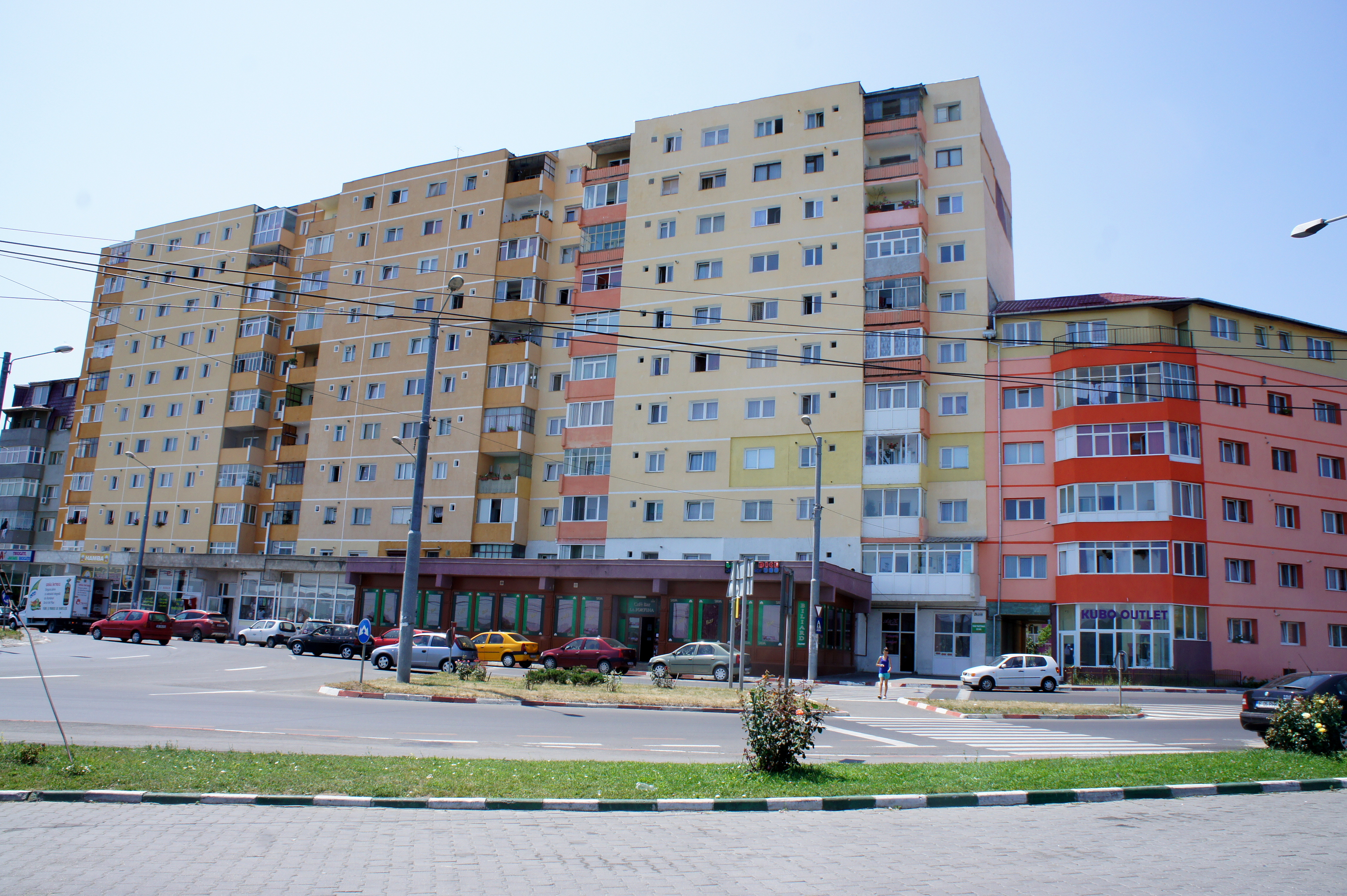 le quartier Vasile Aaron